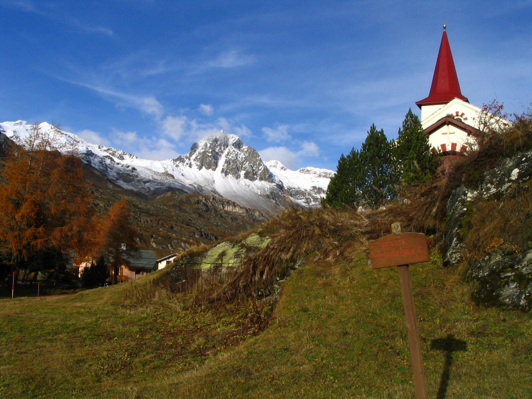 Die alte Kirche in Maloja